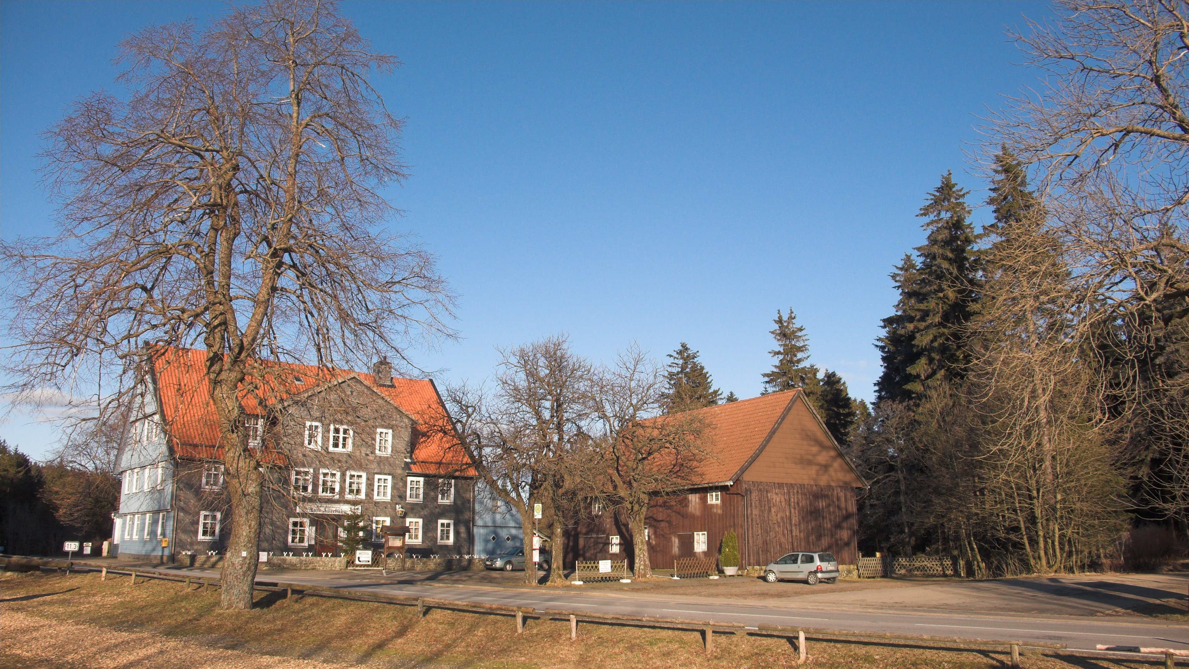 Ehemaliger Gasthof Auerhahn bei Hahnenklee im Oberharz